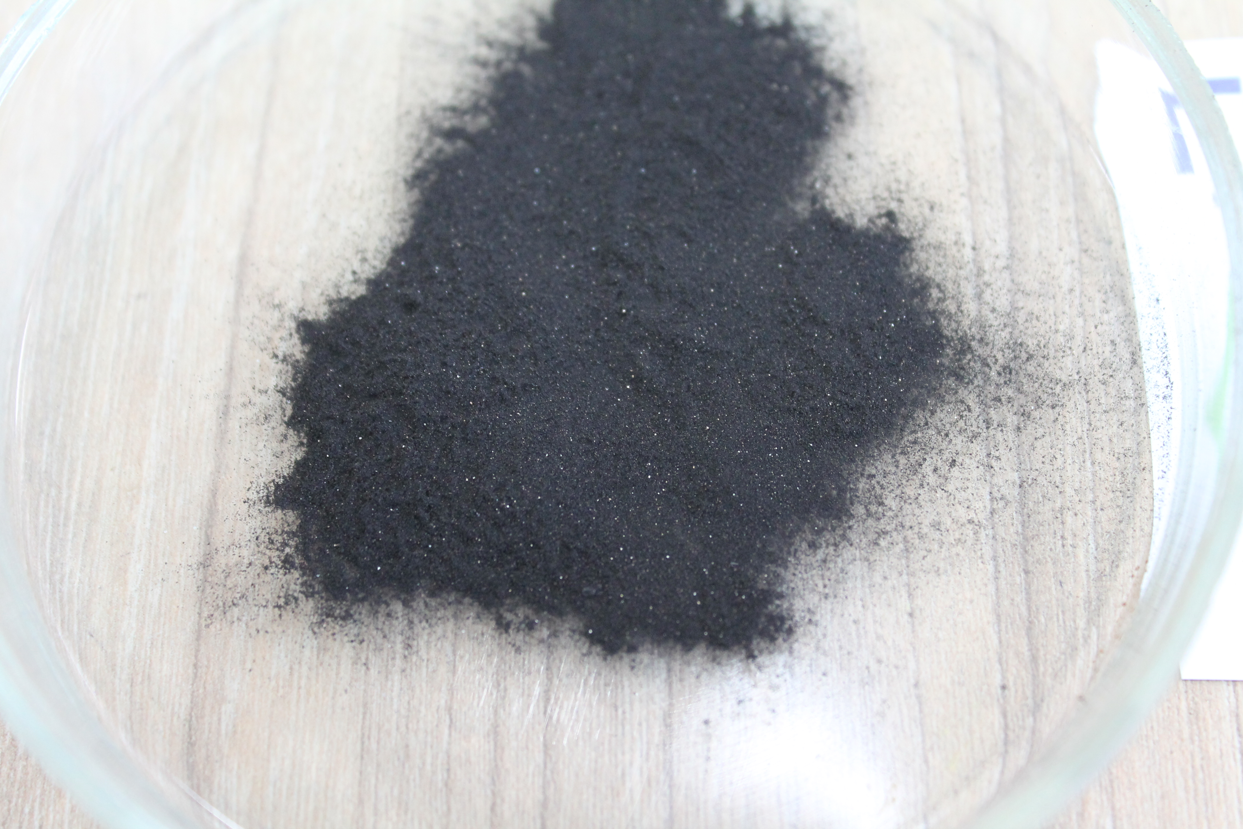 Гумат Калия, вироблений на основі леонардиту